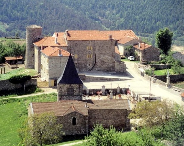 Monestier (Ardèche) église et château